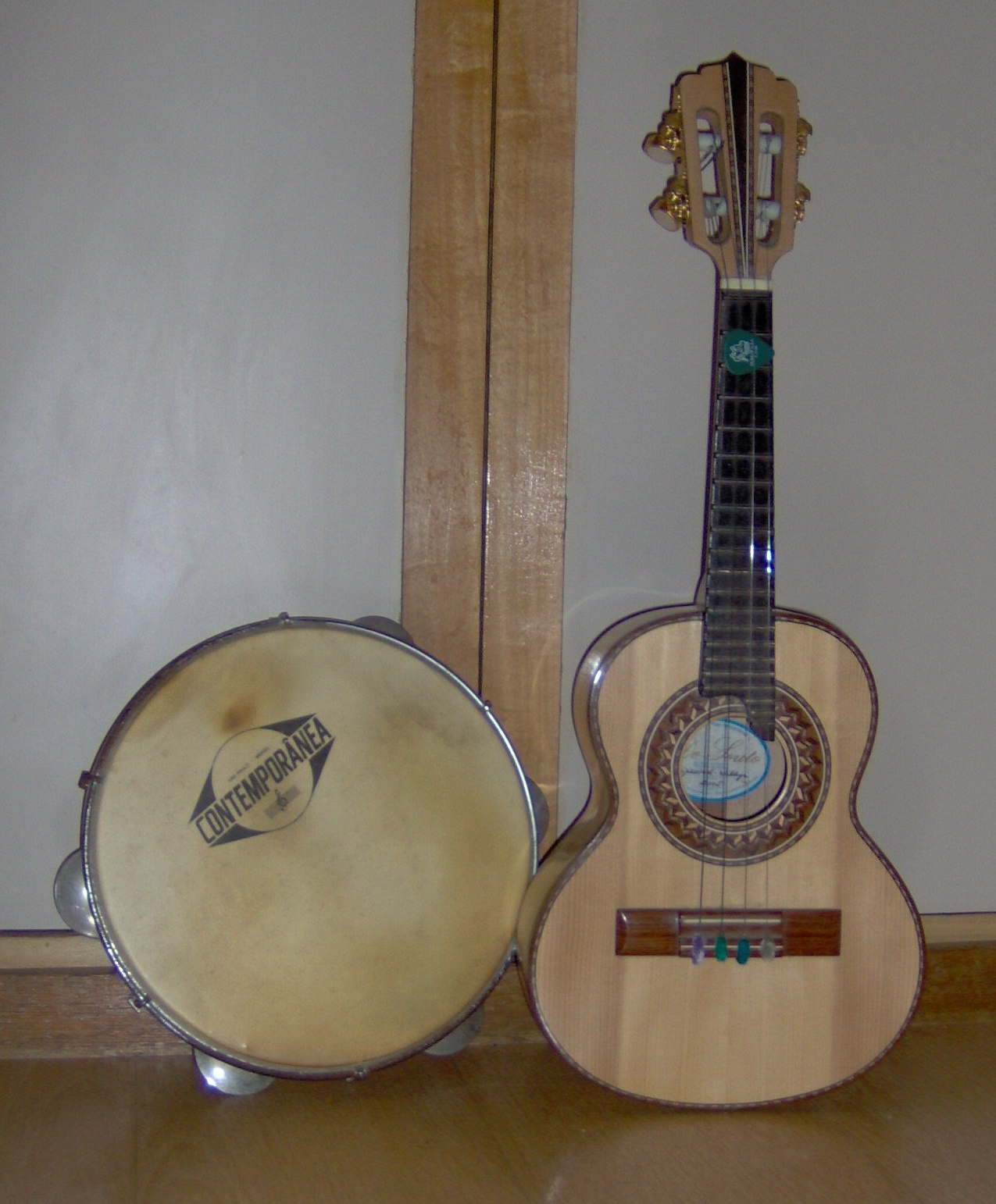 Пандейру и каквако, инструментарий самбы.